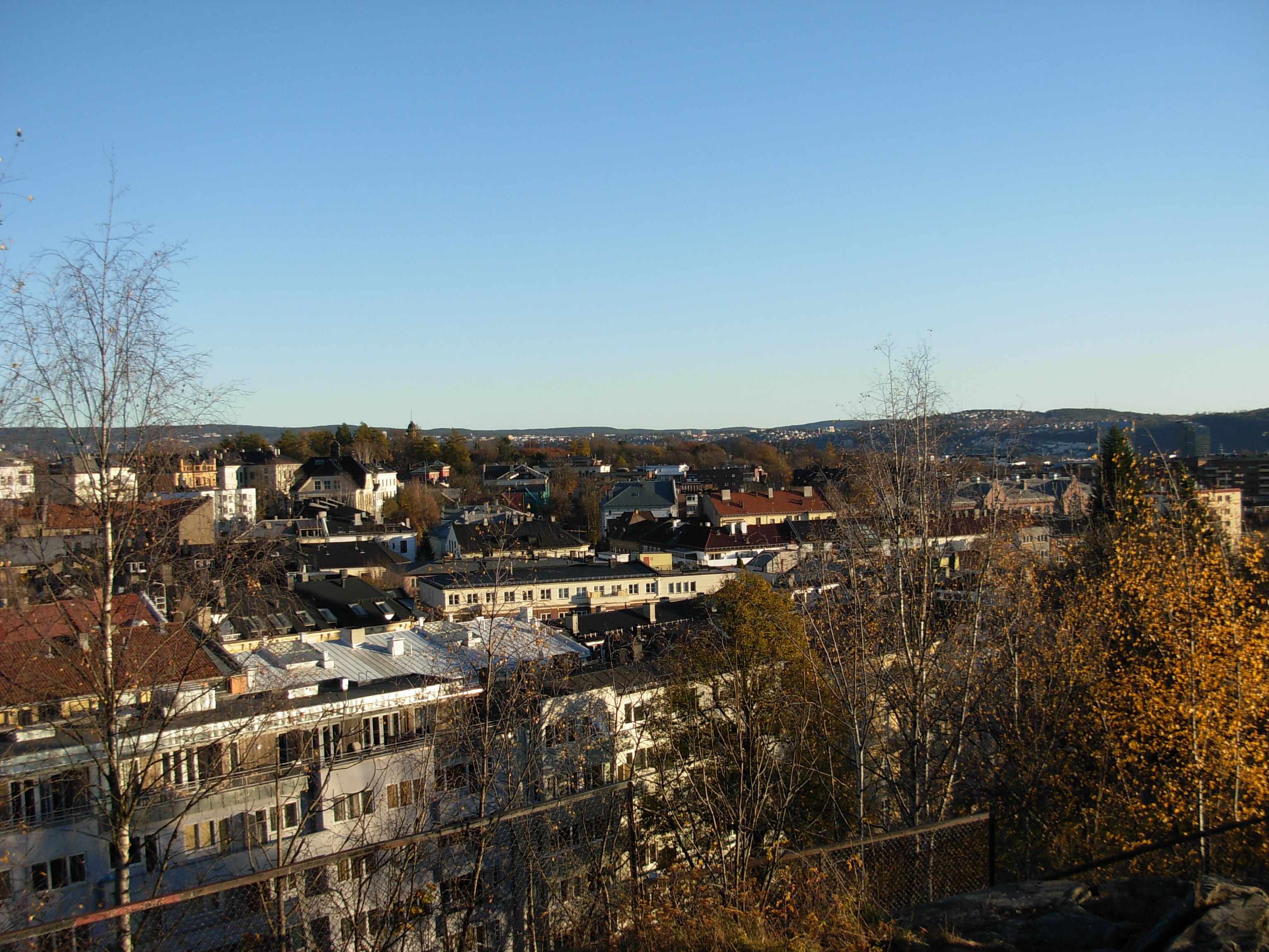 Stensparken, Oslo, view from Blåsen